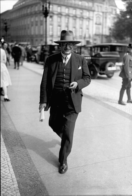 Interessante Politiker auf dem Wege zum neuen Reichstag! Der sozialdemokratische Abgeordnete des Wahlkreies Potsdam, Herr Bernhard begibt sich in den neuen Reichstag.